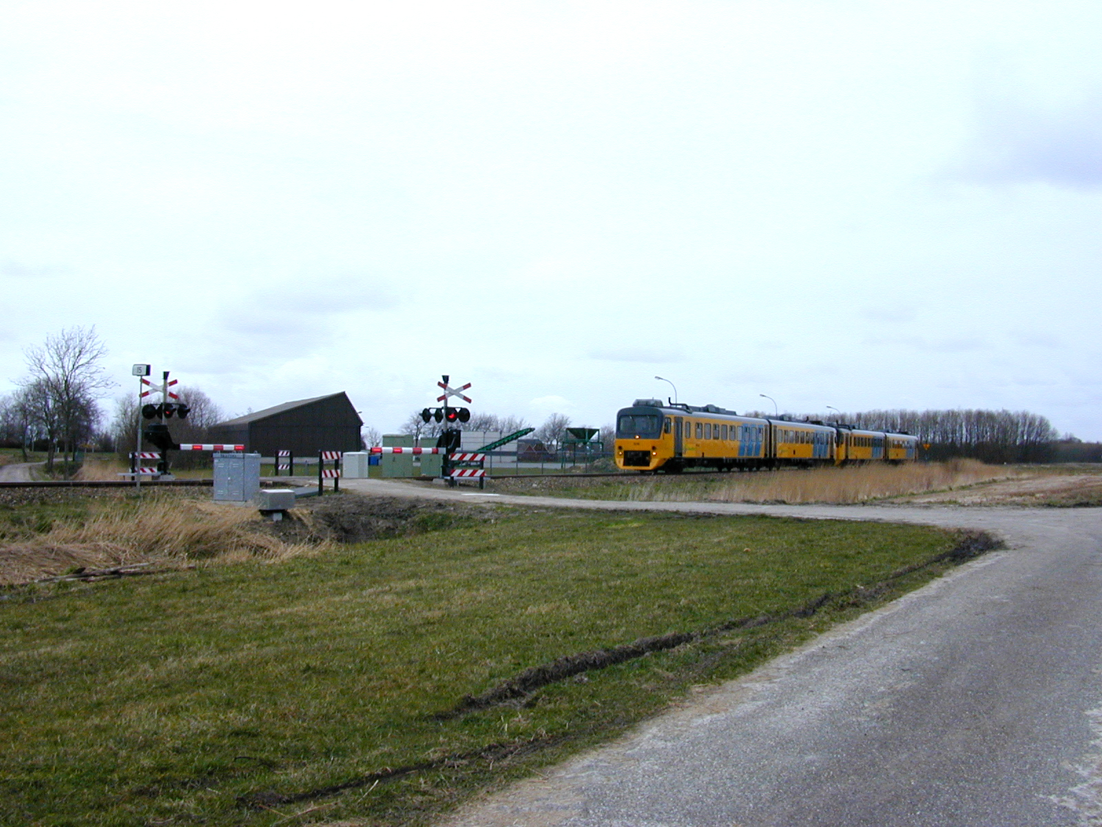 De eerste spoorwegovergang die als Mini-AHOB in de spoorlijn Sauwerd - Roodeschool (Hogelandspoor) op 12 maart 2002 in de Binnenweg te Usquert in gebruik werd genomen. De NoordNed treinstellen zijn van het type Wadloper.